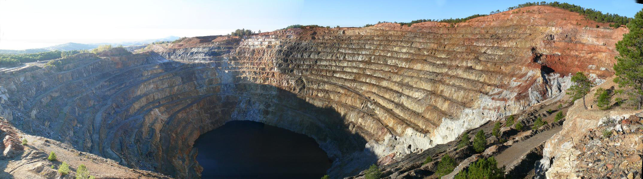 Panorámica de Corta Atalaya (actualizada).